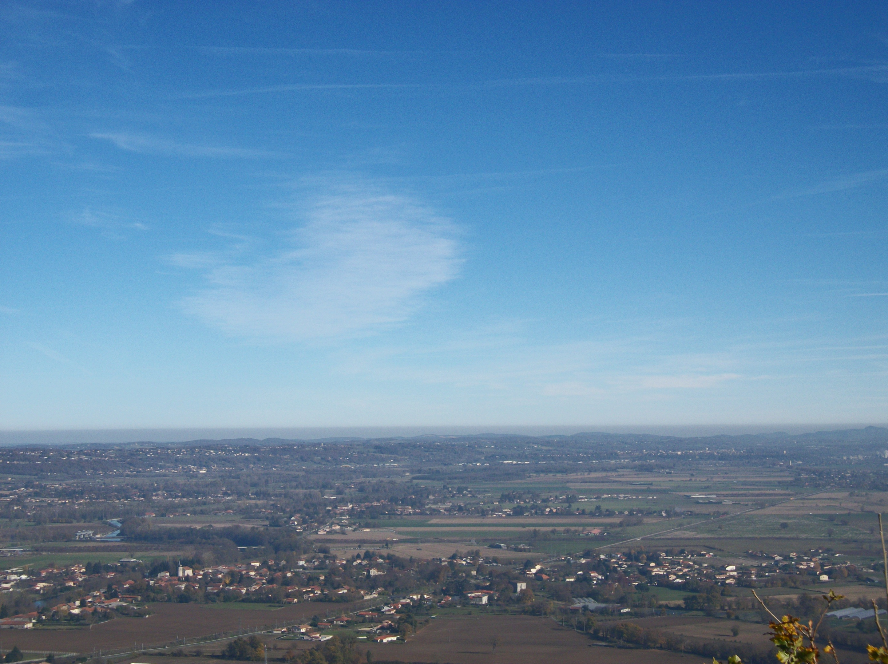 Village de Huos au premier plan depuis le Picon à 630 m